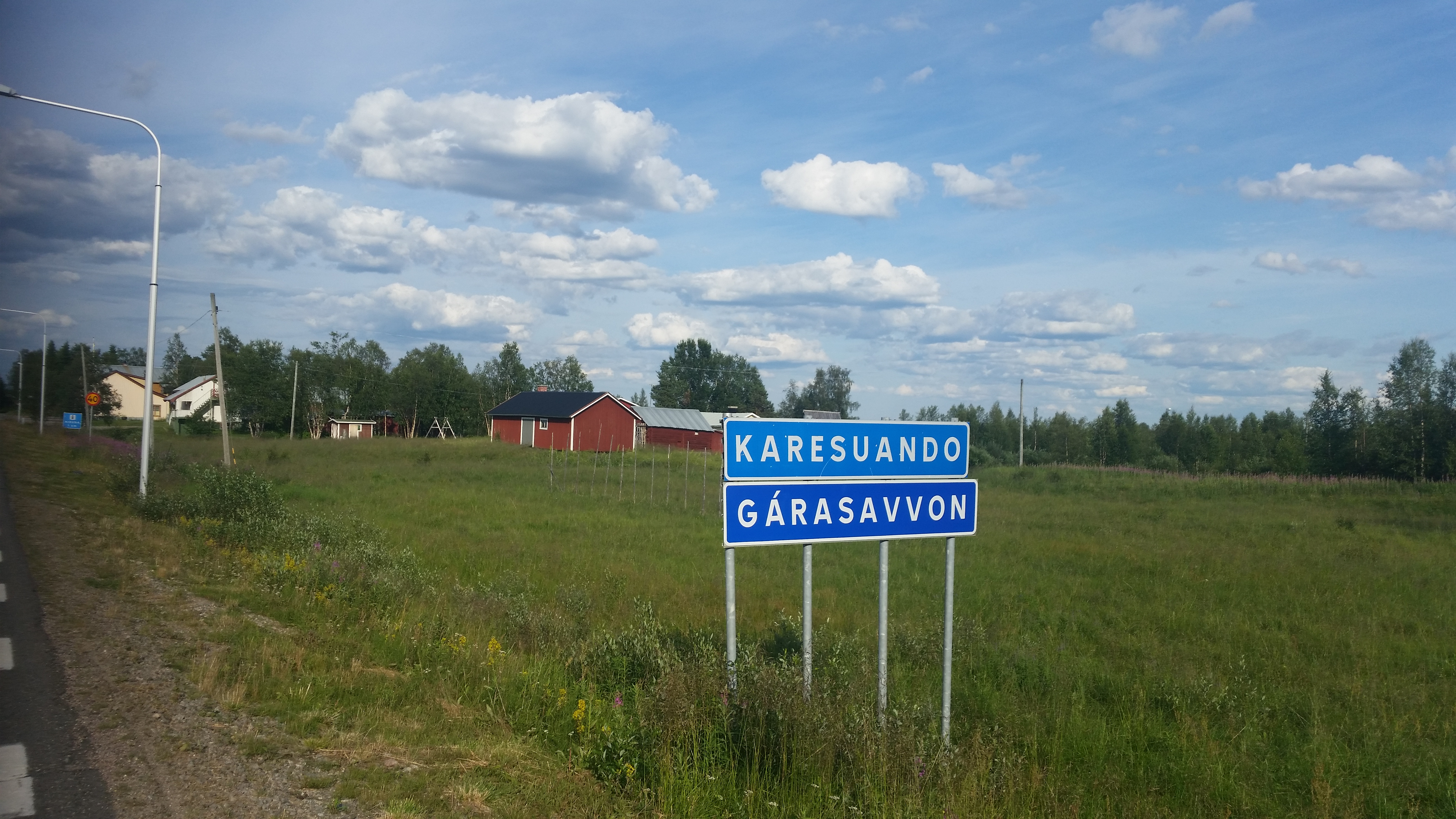 Grenze Finnland - Schweden Flussquerung Mounio Jokki/Älv Kaaresuvanto - Karesuando